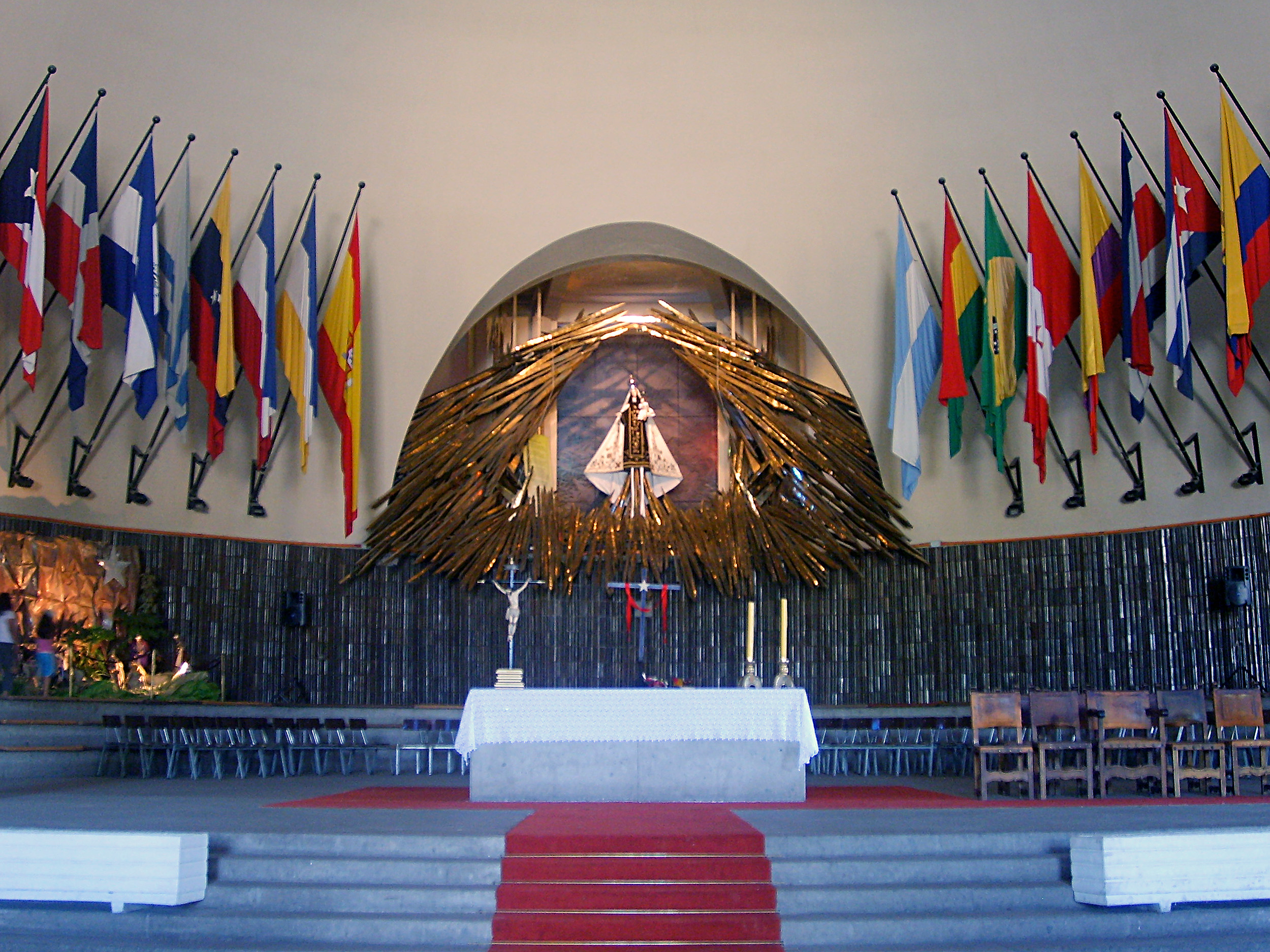 Altar del Templo Votivo de Maipú. Foto obtenida por Valo el 21 de diciembre de 2006 en Maipú.